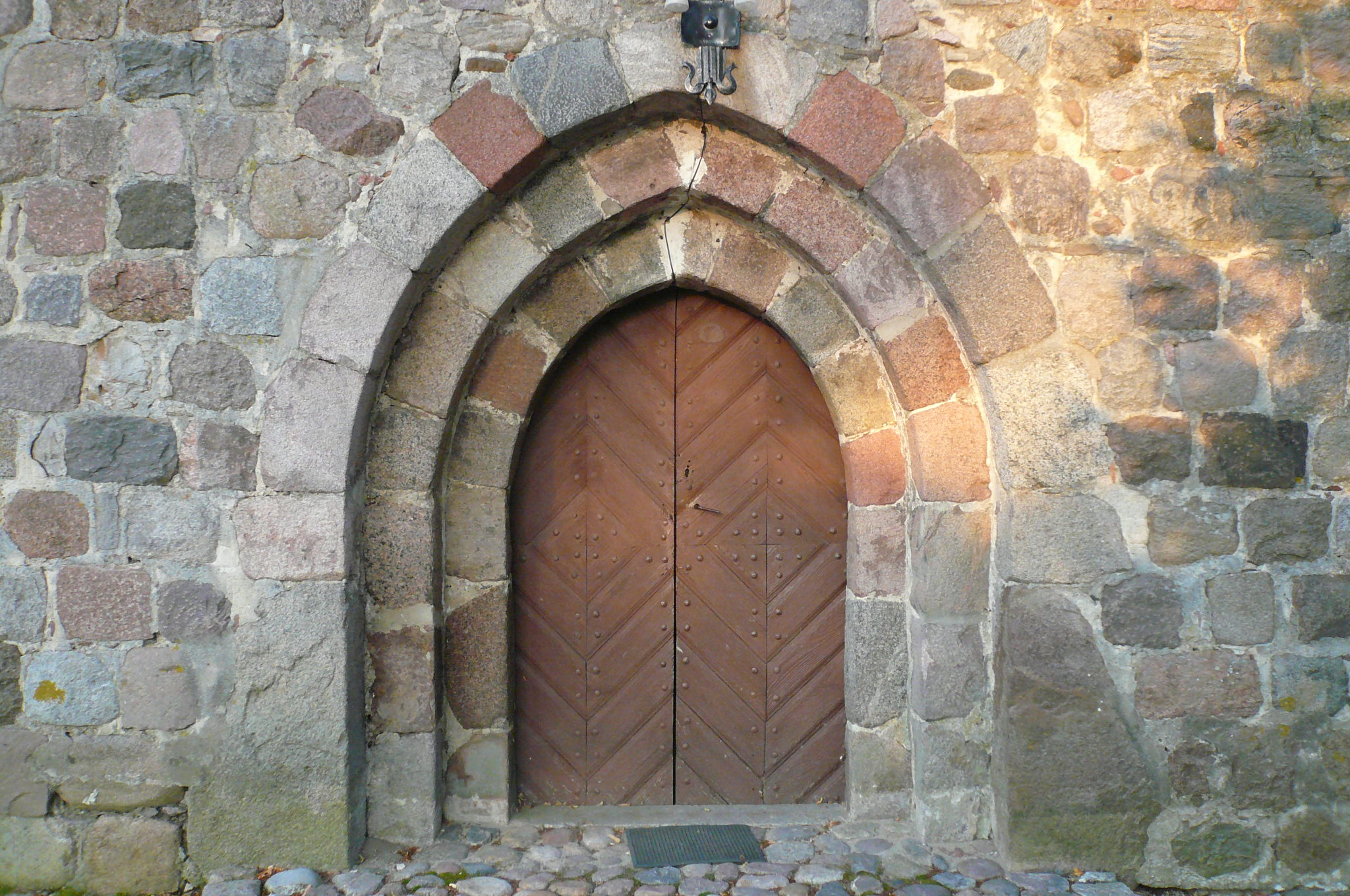 Dolsko - rzymskokatolicki kościół filialny p.w. św. Elżbiety, 2 poł. XIII (portal główny ze słabo widocznym znakiem szachownicy)